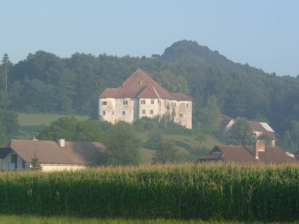 Grad Škrljevo